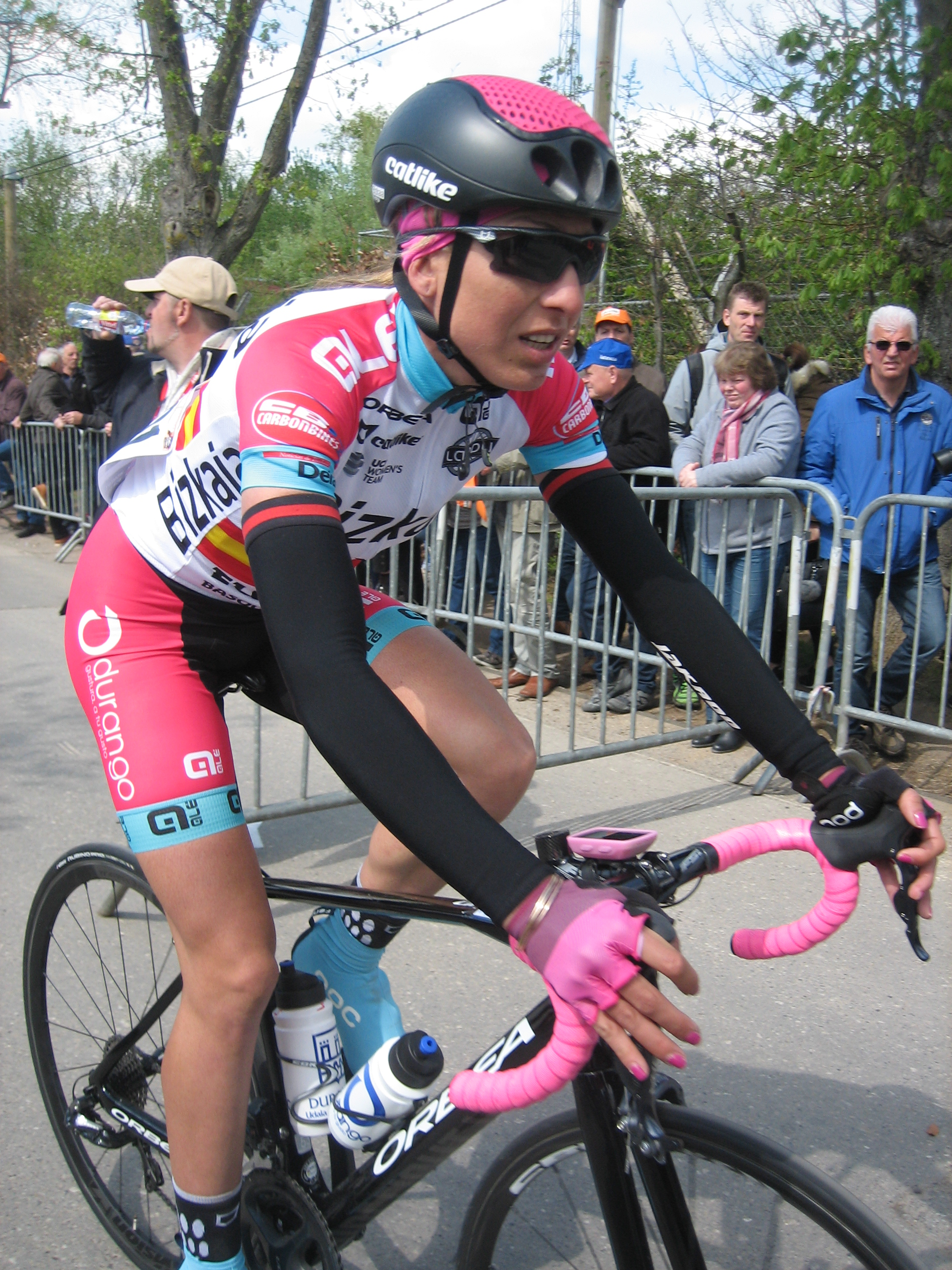 Finish van de Waalse Pijl 2017 in Huy.